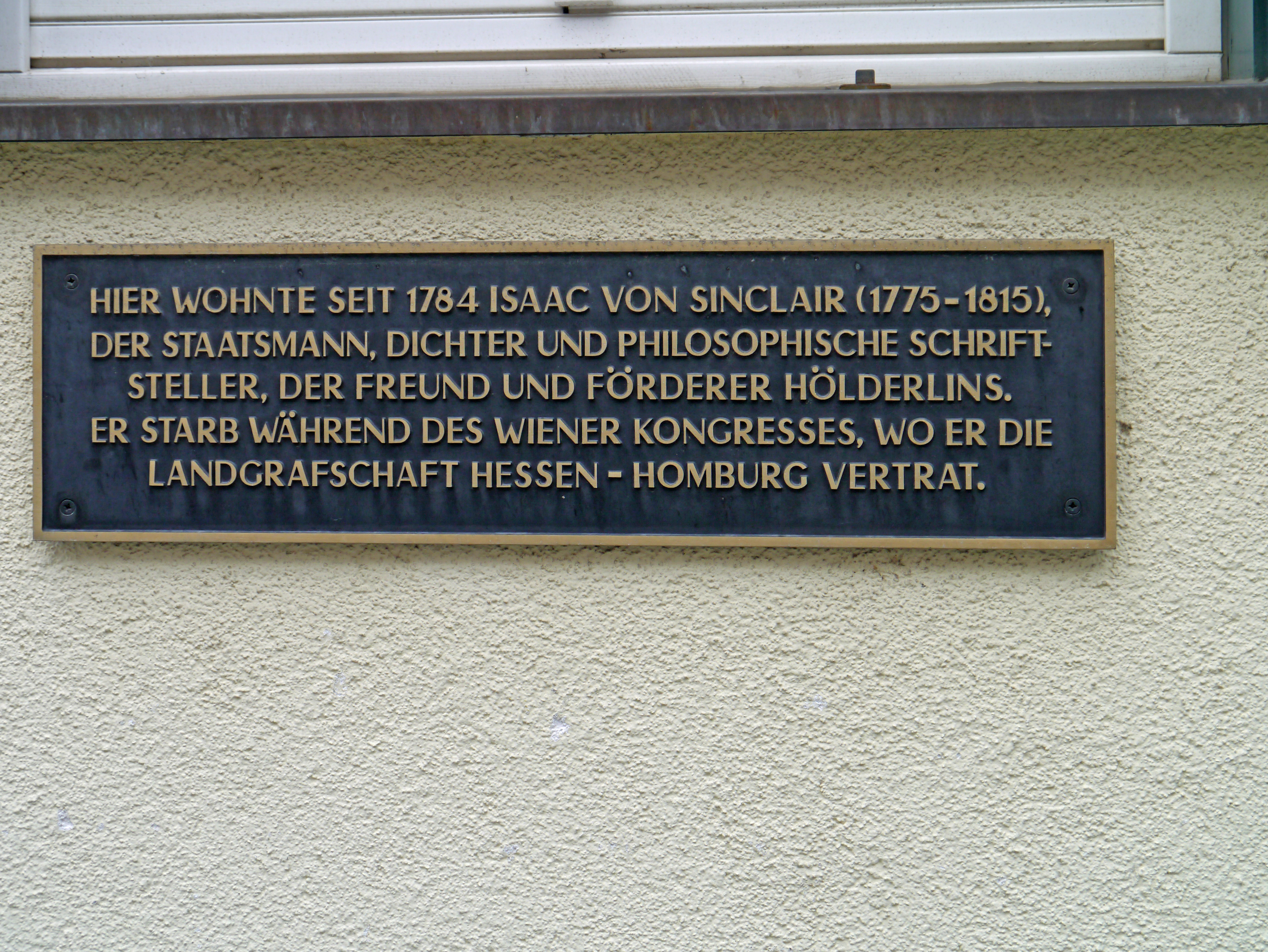 Gedenkplakette an Isaac von Sinclair. An der Stelle wo sich das ehemalige Wohnhaus des Diplomaten befand. Jetzige Adresse: Dorotheenstrasse 6 in Bad Homburg.